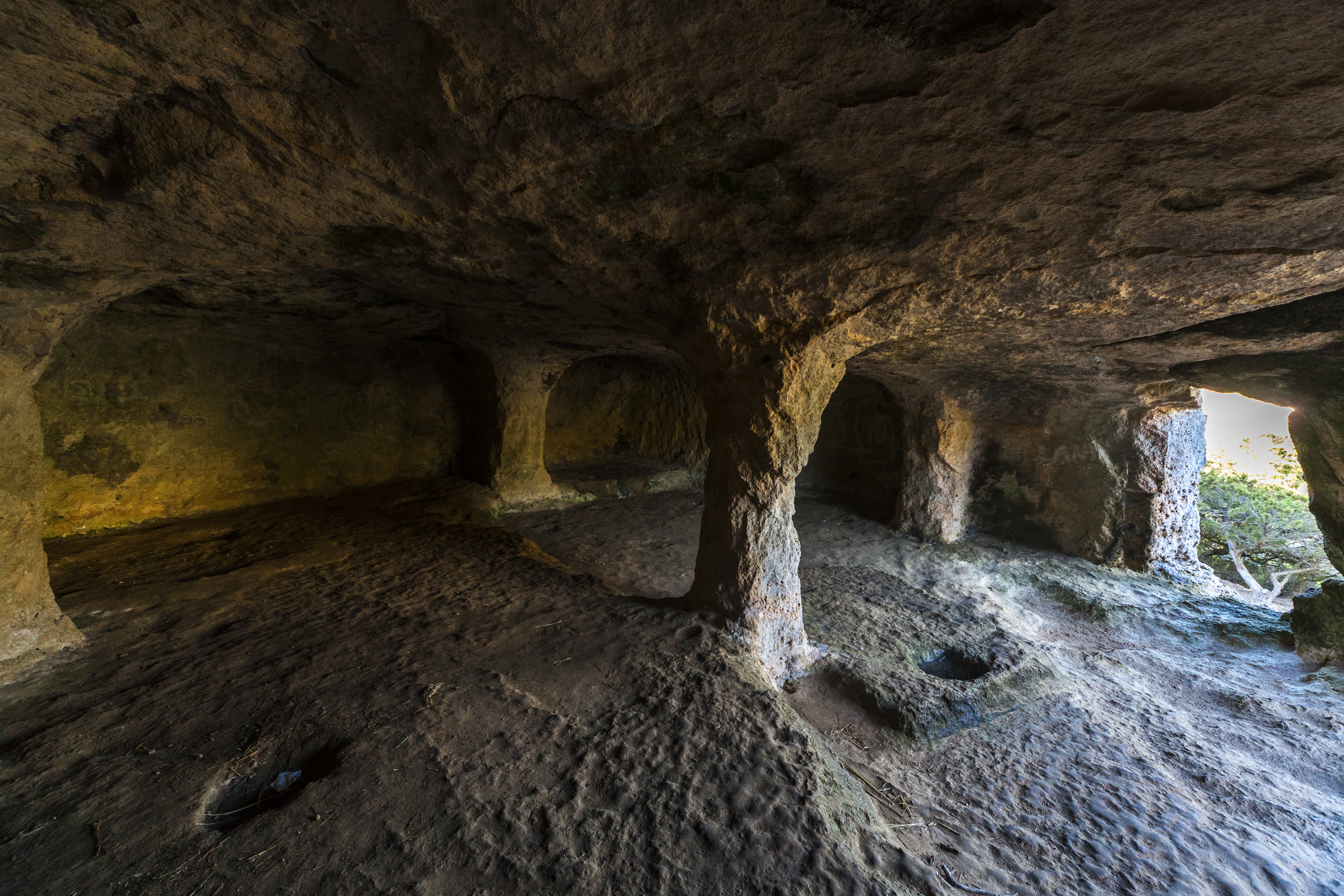 Interior d'una de les coves posttalaiòtiques de la necròpolis de Cala Morell